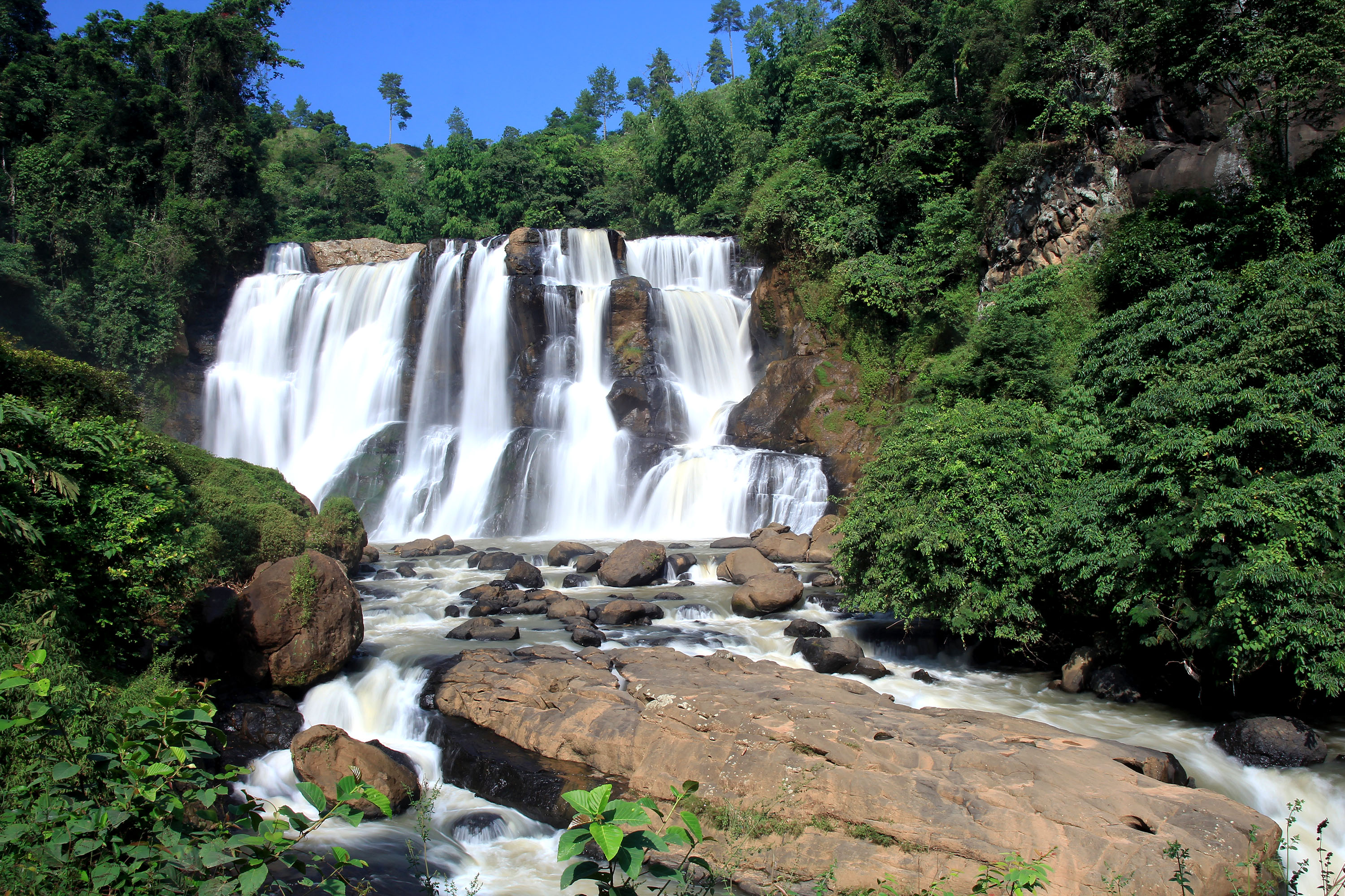 Curug Malela merupakan curug tersembunyi yang terdapat di Kabupaten Bandung Barat. Karena kemegahannya, curug ini banyak dijuliki orang sebagai Niagaranya Indonesia. Malela diambil dari nama seorang penduduk lokal yang kuburannya terletak di sekitar curug malela ini. Curug Malela terletak 68 km dari pusat kota Bandung. Walaupun akses jalan yang kurang baik, tetap saja curug ini diminati wisatawan, terutama wisatawan lokal.